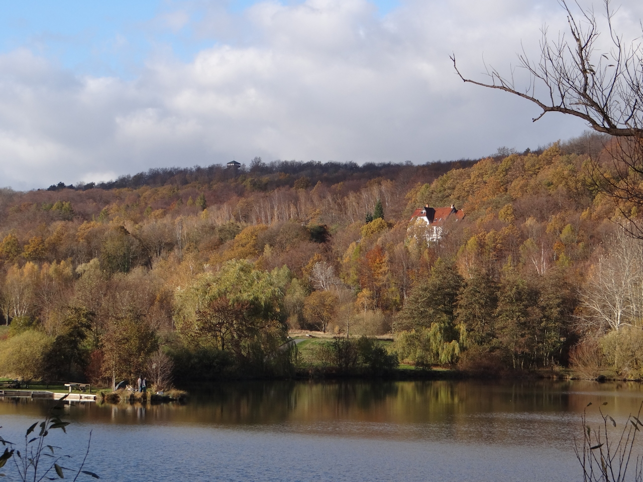 Herbstlicher Harly-Wald mit Vienenburger See, zu sehen ist der Harly-Turm und ein Wohngebäude am ehemaligen Schacht II